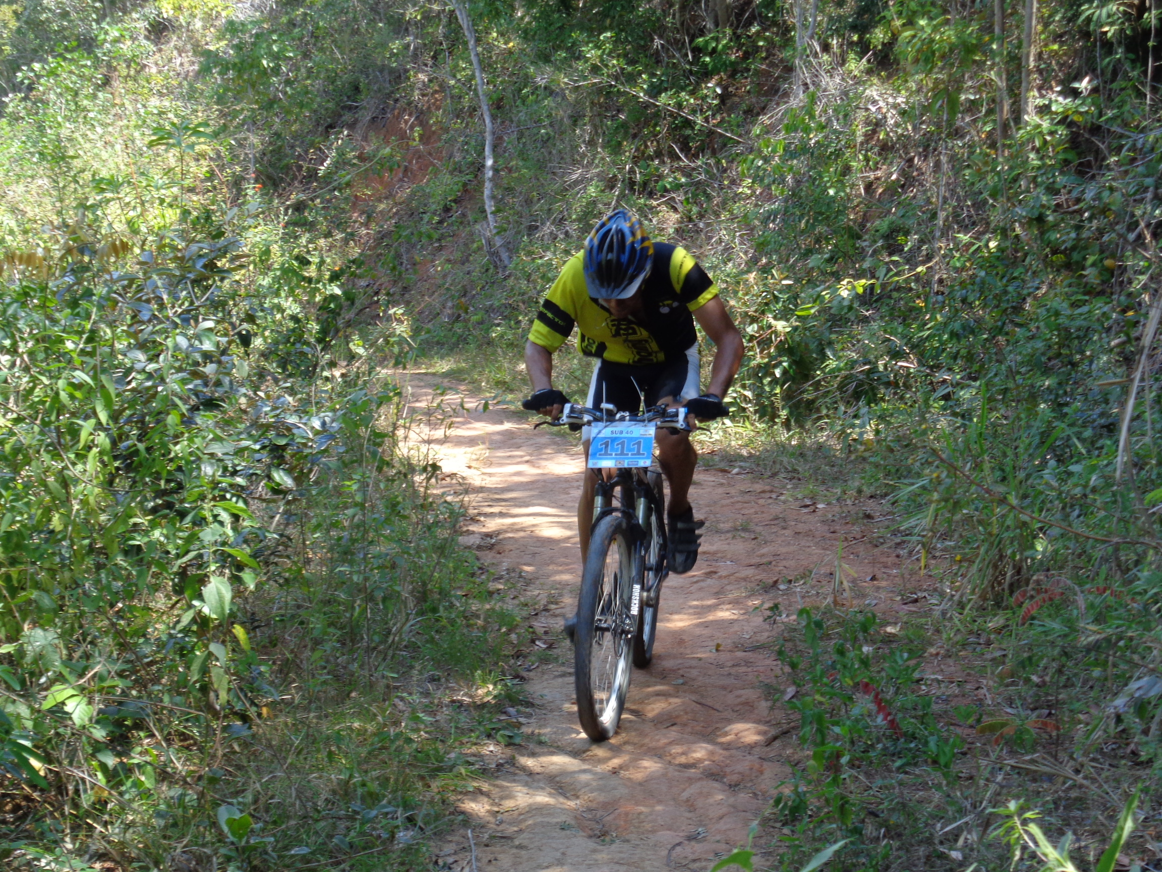 Epic Trail 2014